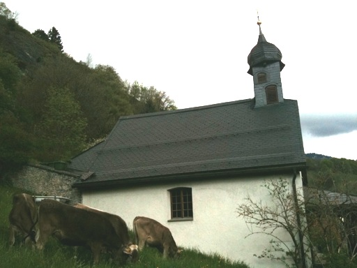 reformierte Kirche Schmitten-Seewis, Kanton Graubünden